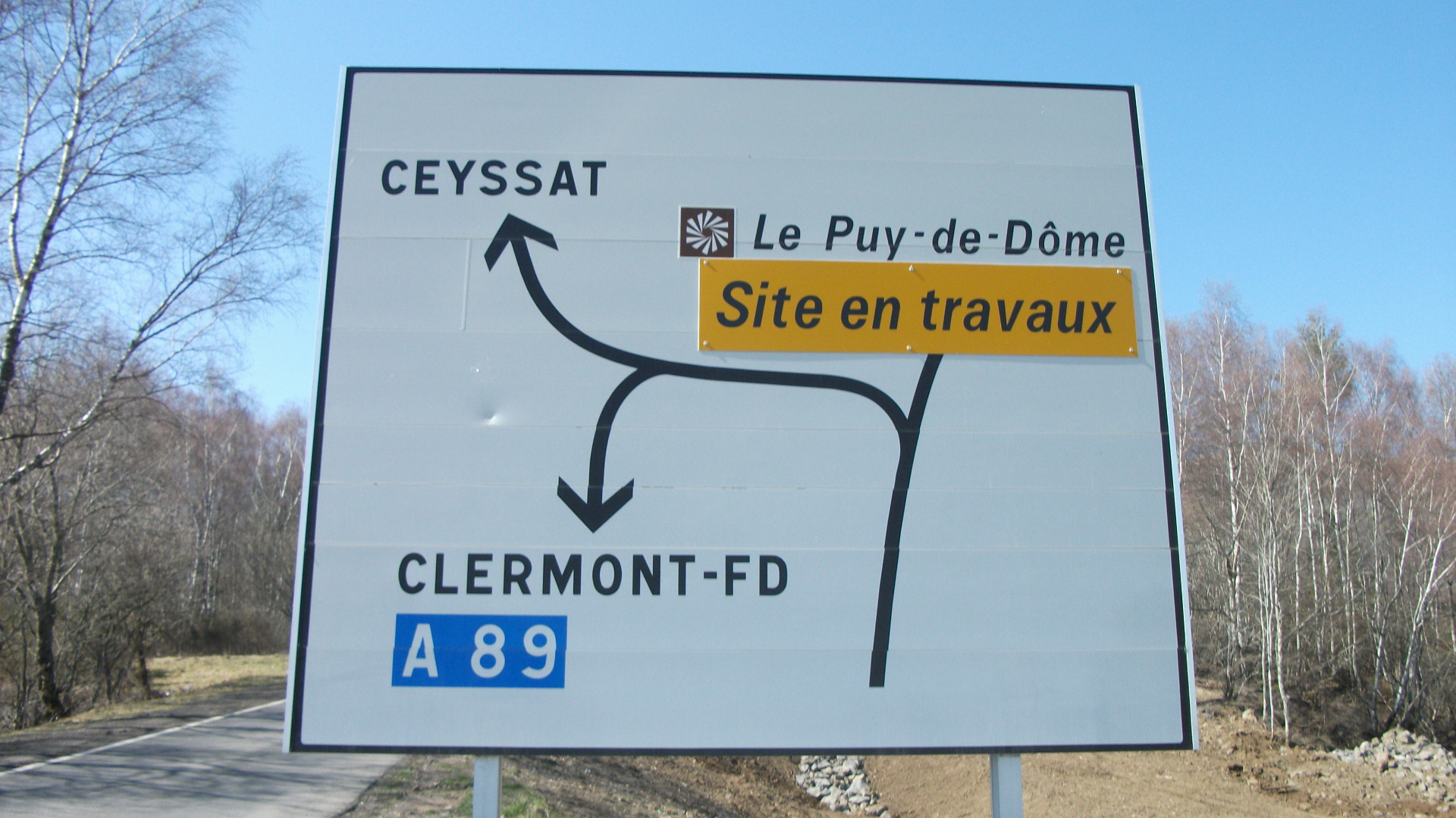 Panneau D42a sur la D 68 (Franche-Comté, 2007) pour les directions de Ceyssat, du Puy de Dôme (avec idéogramme ID16b Site classé et encart Site en travaux) et de Clermont-Fd et A 89